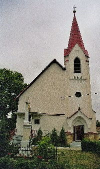 Kirche zur Jungfrau Maria in Hoste